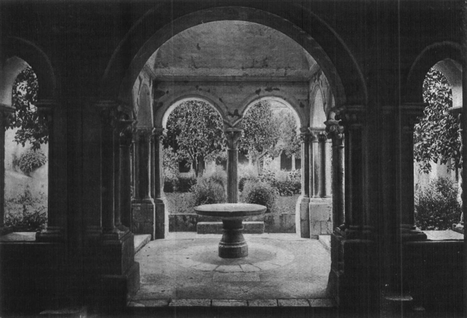 Image illustrant « L'abbaye de Fontenay et l'architecture cistercienne »